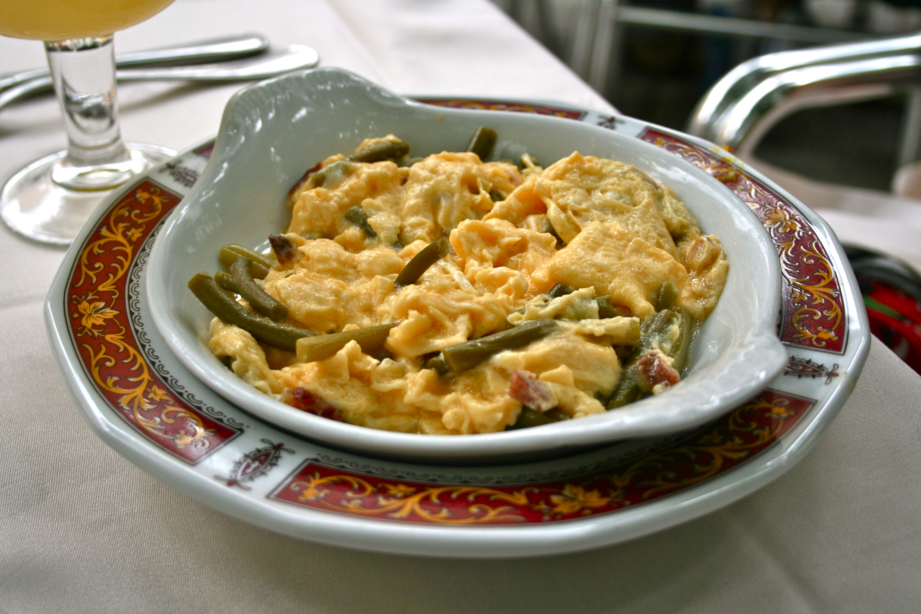 Revuelto de ajetes - Escorial